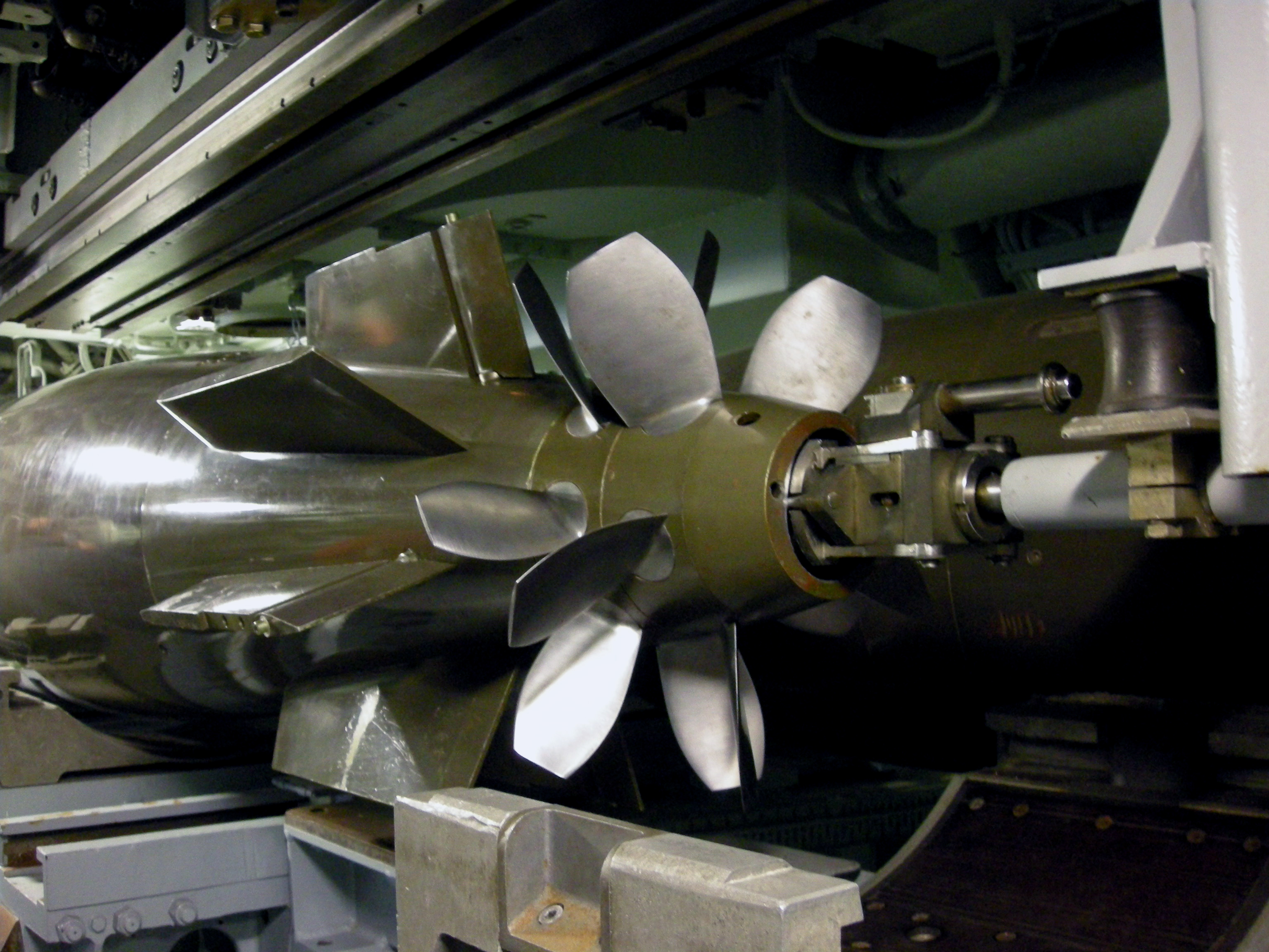 Torpille, sous-marin Redoutable à la Cité de la Mer de Cherbourg